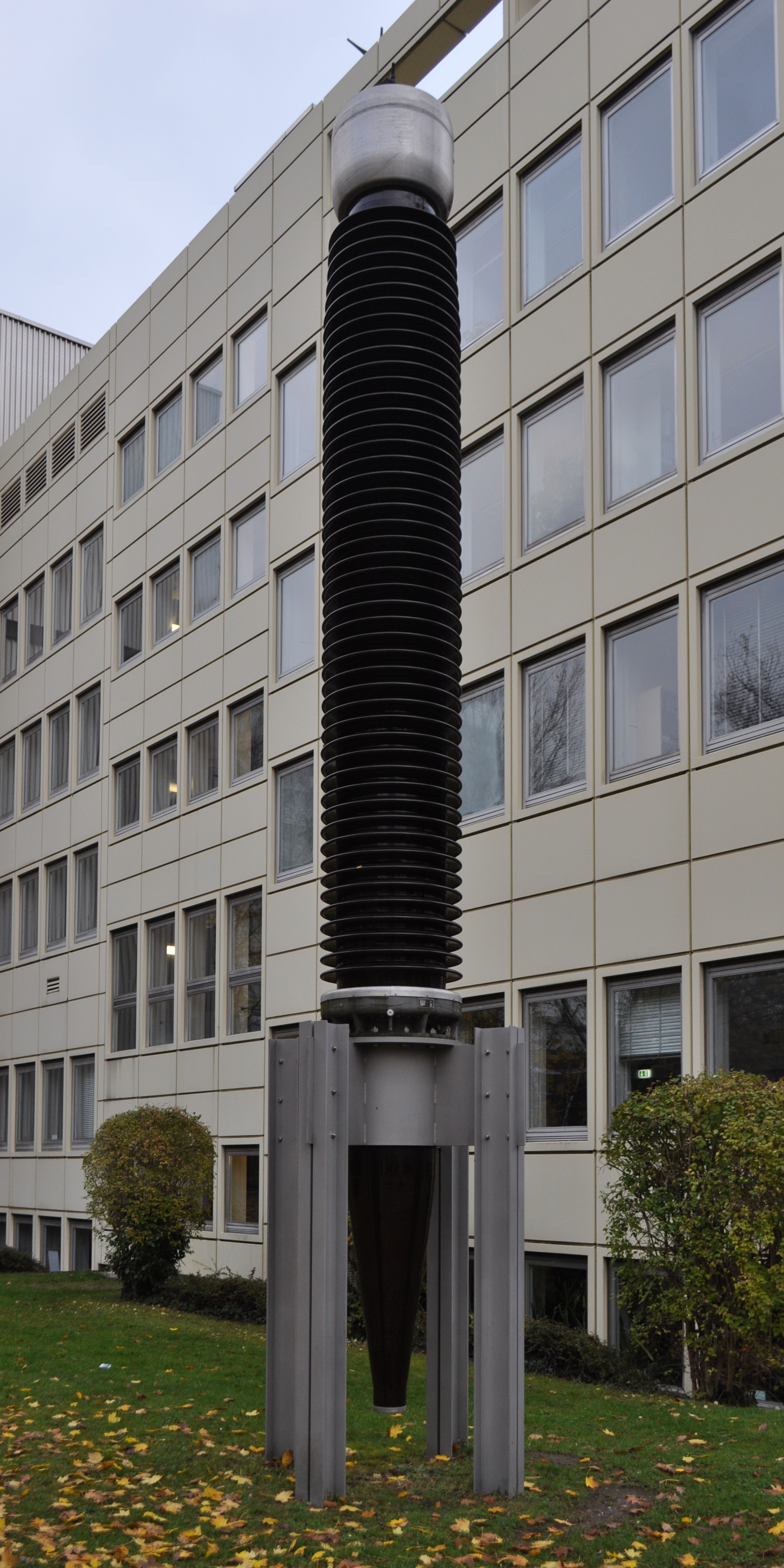 Hochspannungsdurchführung auf dem Gelände des Karlsruher Instituts für Technologie, Engesserstraße Ecke Fritz-Haber-Weg, Karlsruhe-Innenstadt-Ost. This is a photograph of an architectural monument.It is on the list of cultural monuments of Karlsruhe